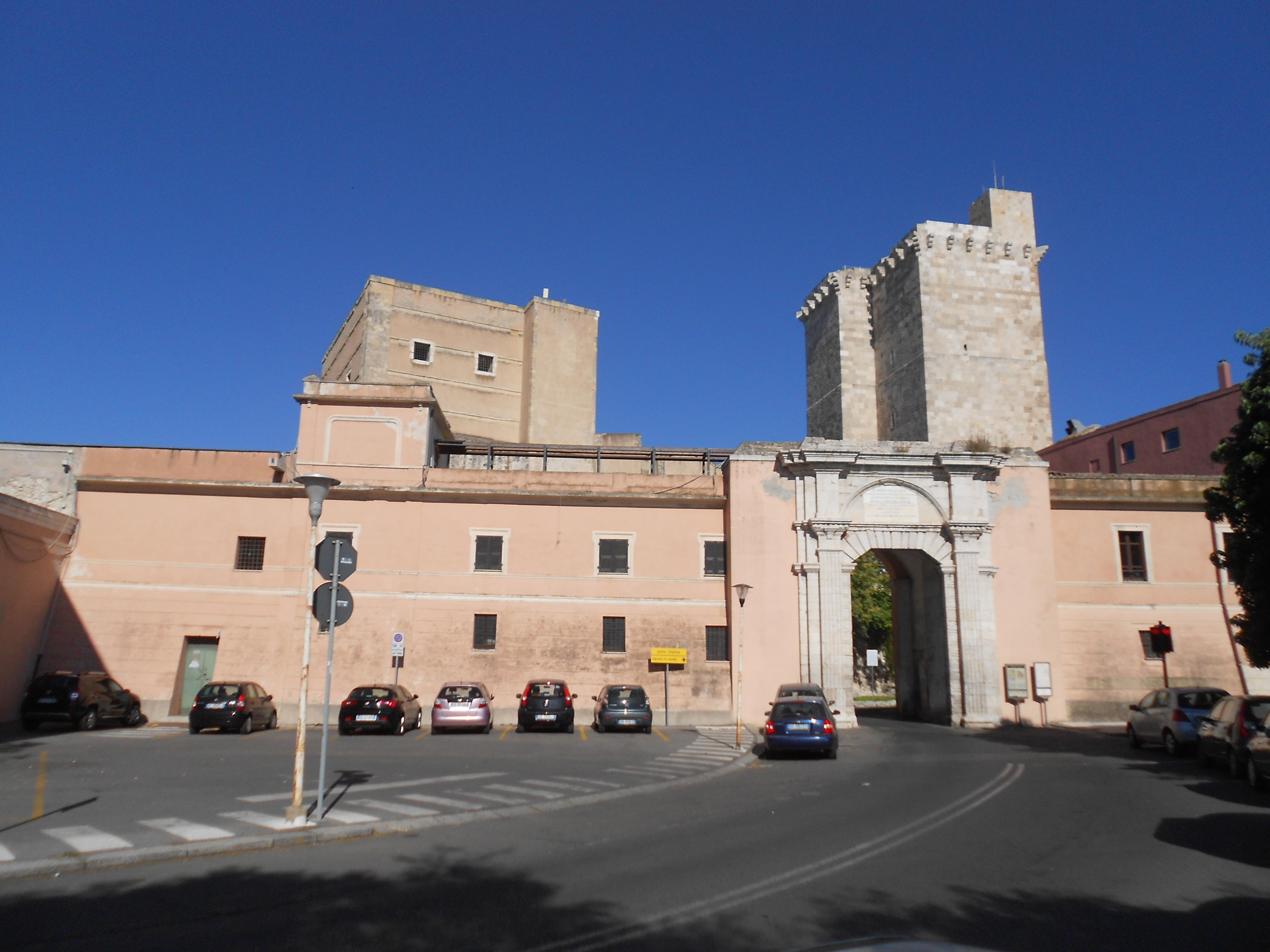 Area archeologica di Sant'Eulalia - MIBAC This is a photo of a monument which is part of cultural heritage of Italy.